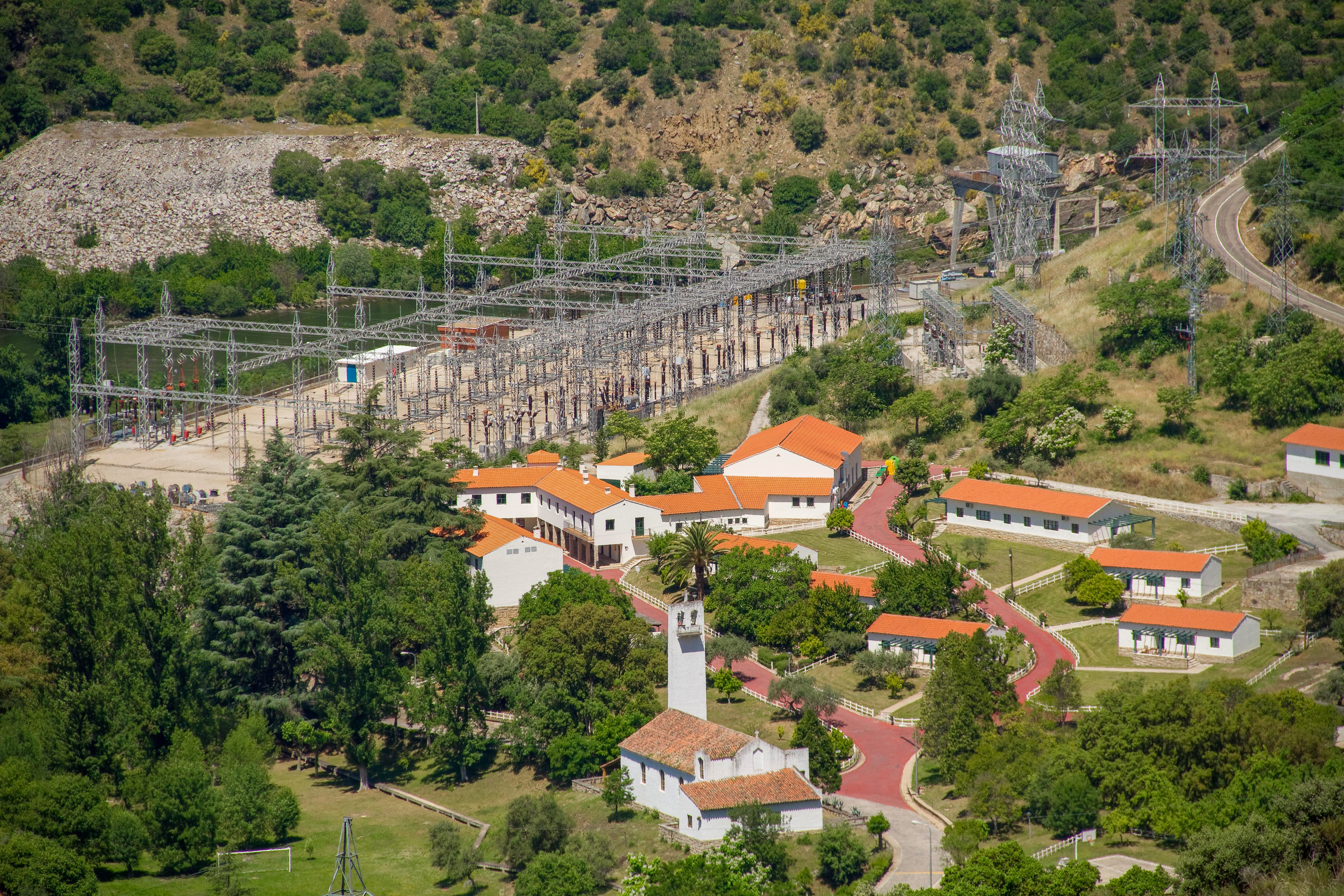 Central hidroeléctrica Saucelle I en la presa de Saucelle, Parque Natural de Arribes del Duero, España. Vista obtenida desde el mirador del Salto. Las casas que se ven son del Poblado del Salto de Saucelle.